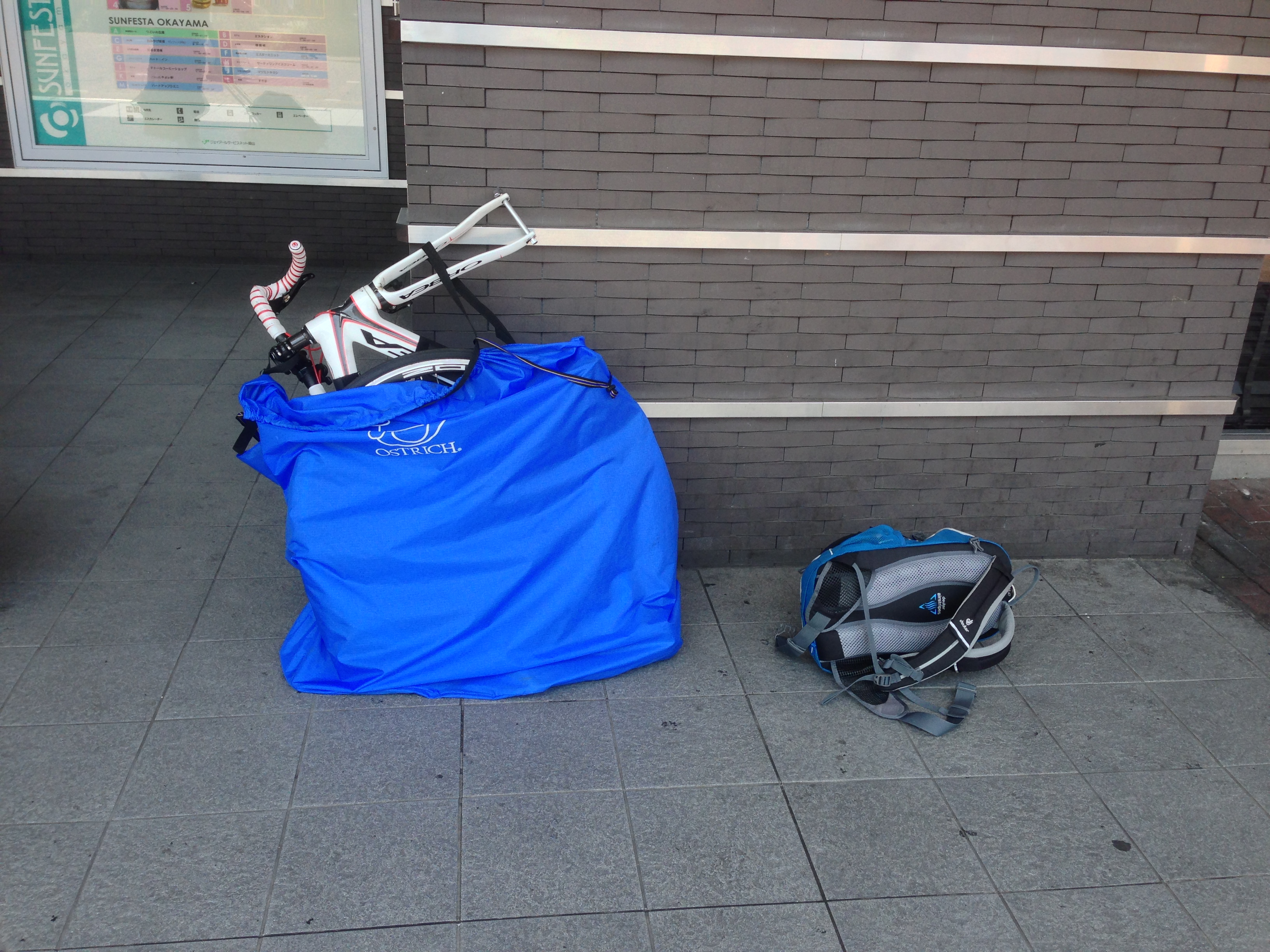 輪行袋への収納形態（前後車輪を外すタイプ）